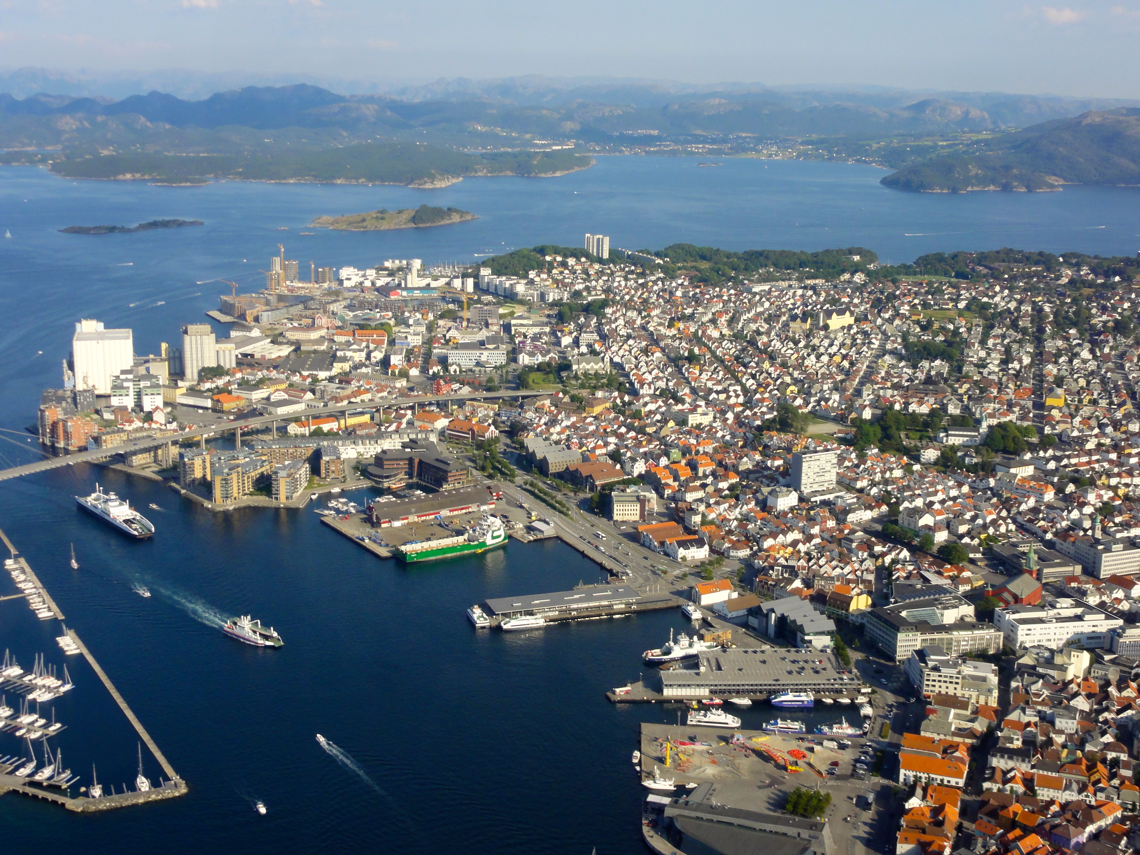 Straumsteinsundet i Stavanger, Gandsfjorden i øvre del av bildet.